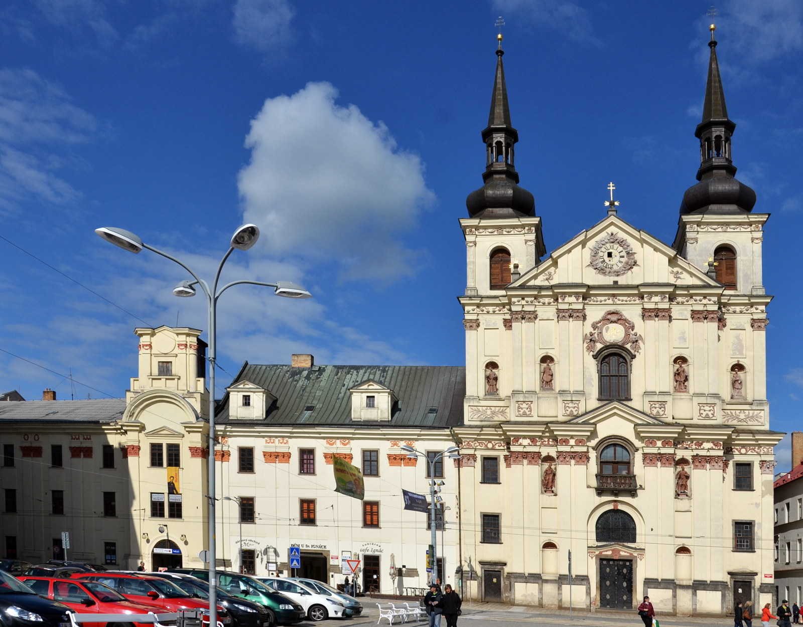 Kostel svatého Ignáce z Loyoly, Jihlava